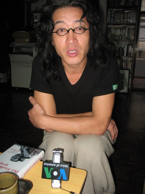 贝岭谈春节(美国之音申华拍摄)